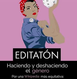 Póster académico de promoción de un editatón, con la leyenda "Por una Wikipedia más equitativa: Haciendo y deshaciendo el género". Un editatón es una wikimaratón de ediciones, en el que los editores se reúnen para editar y mejorar juntos un determinado tema o un grupo específico de artículos de Wikipedia. Básicamente, un editatón suele orientarse para cumplir dos objetivos principales: (1) Mejorar y ampliar el acervo de artículos de Wikipedia ; (2) Aprovechar la actividad para también entrenar a los participantes en cuanto a sus conocimientos sobre la wikiedición, ya fuere a nivel introductorio y orientado a personas con muy poco dominio de la wikiedición, o ya fuere a nivel más avanzado y orientado a mejorar el conocimiento de los wikipedistas en cuanto a algún aspecto específico, como por ejemplo, manejo y definición de tablas, definición y manejo adecuado de la categorización, especificación de galerías de imágenes o de imágenes múltiples, etc.